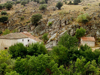 Mingorría. Molino junto a la Adaja en Zorita de los Molinos. Fuente: Eugenio Vega, autor de parte del artículo sobre Mingorría. Copyright: libre de derechos.